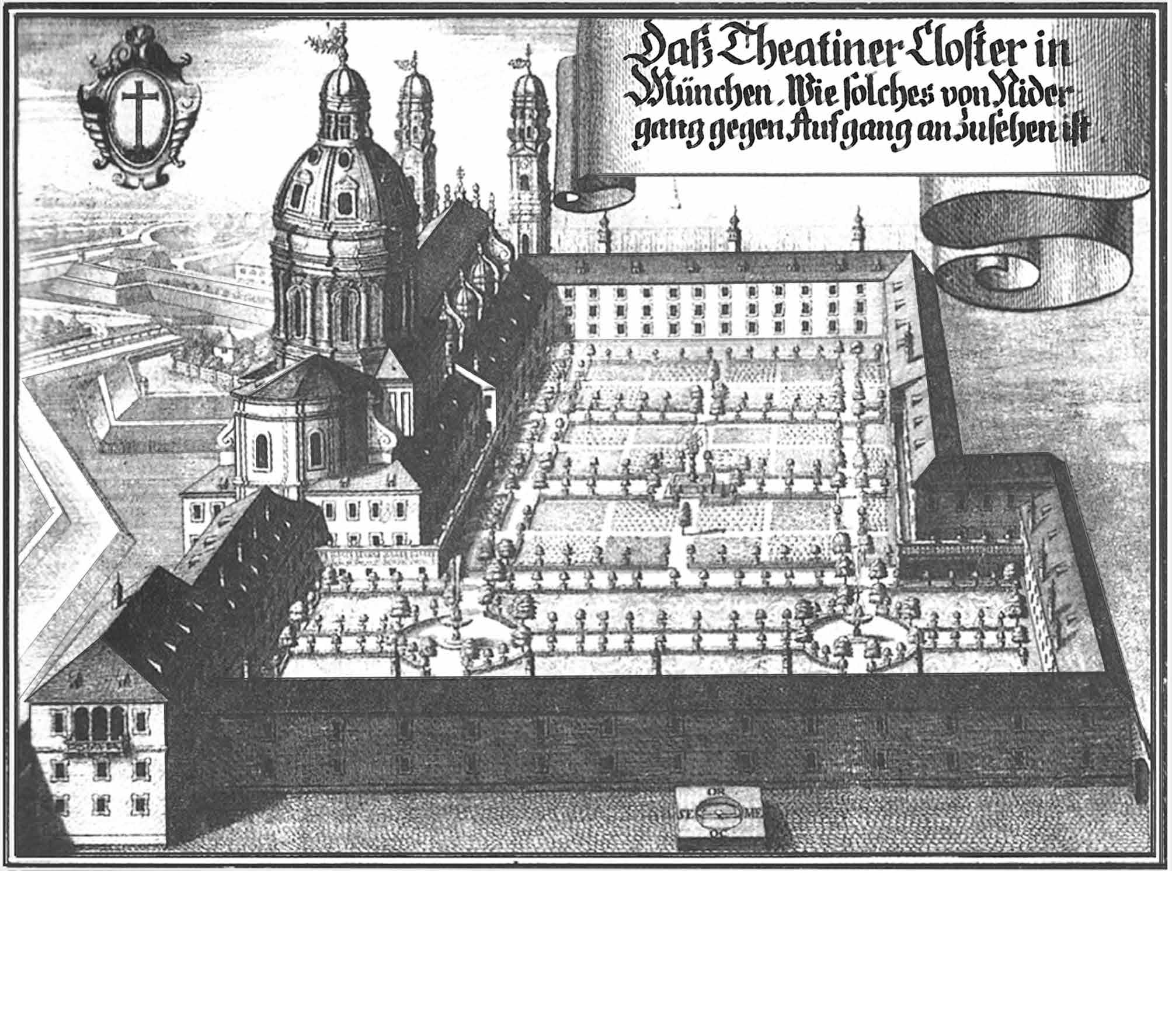 “Daß Theatiner Closter in München, wie solches von Niedergang gegen Aufgang zu sehen ist”, aus: Beschreibung des Churfürsten- u. Hertzogthumbs Ober- und Nidern Bayrn. Rentamt München. 2. Auflage um 1750